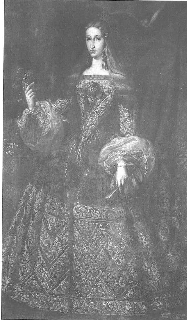 Retrato de la reina Mariana de Neoburgo (1667-1740), que fue reina consorte de España por su matrimonio con Carlos II de España.